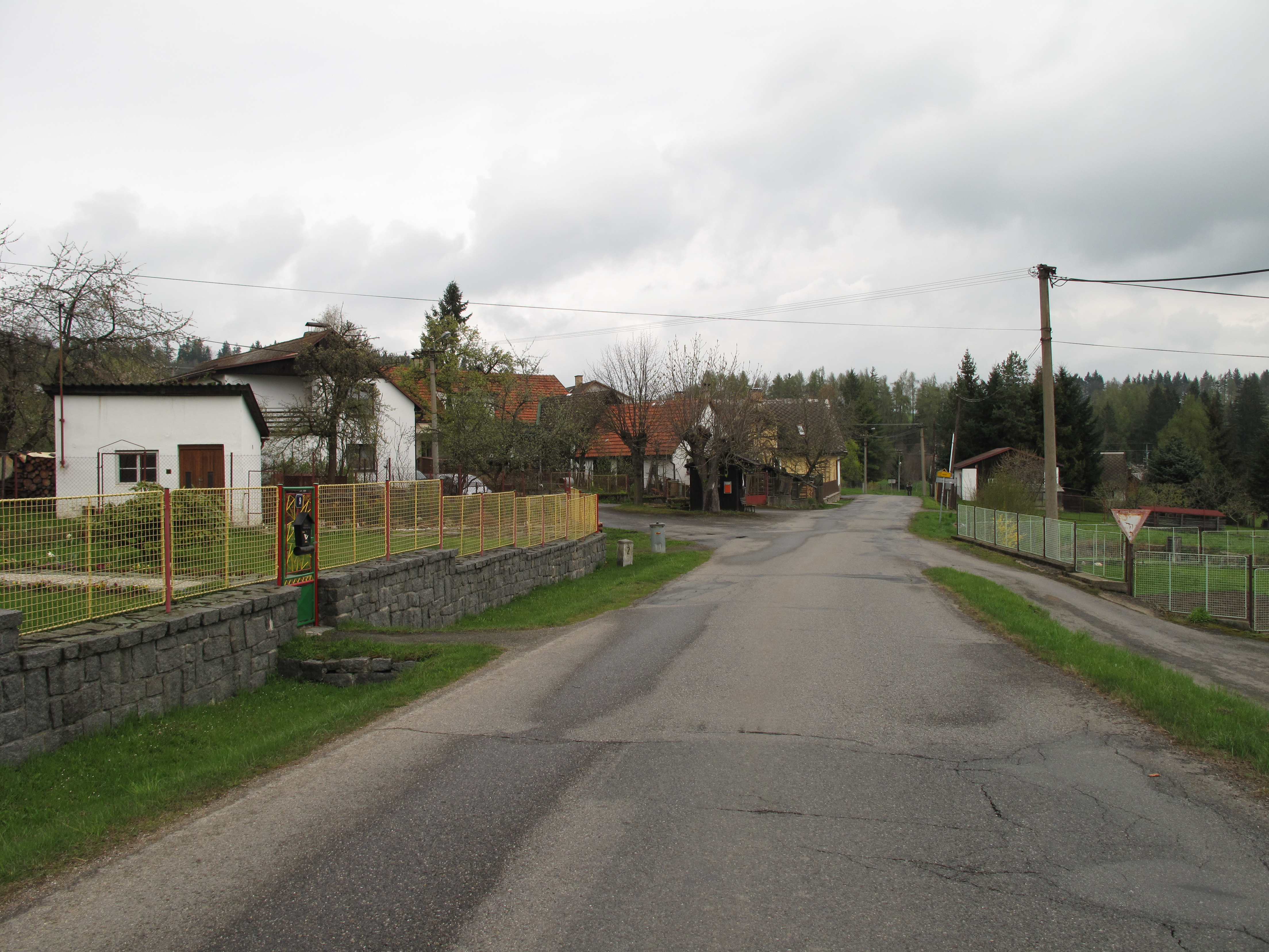 Přestanice. Okres Klatovy, Česká republika.